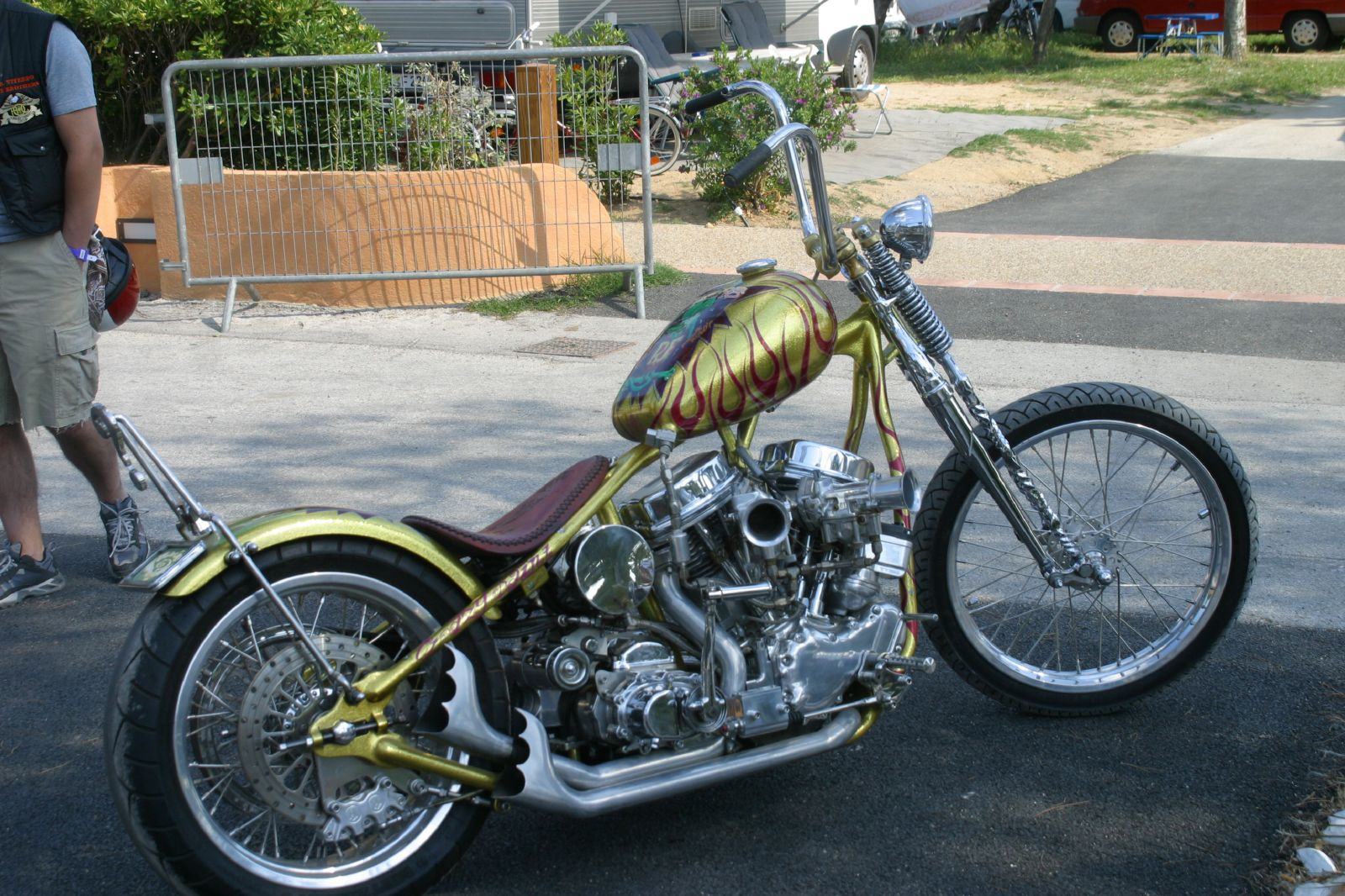 Indian Larry's 2003 bike, Daddy-O (Rat Fink)